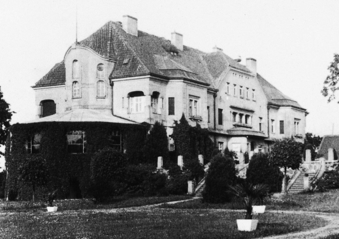 Gutshaus Adlig Laukischken, Landkreis Labiau, Ostpreußen (um 1900)